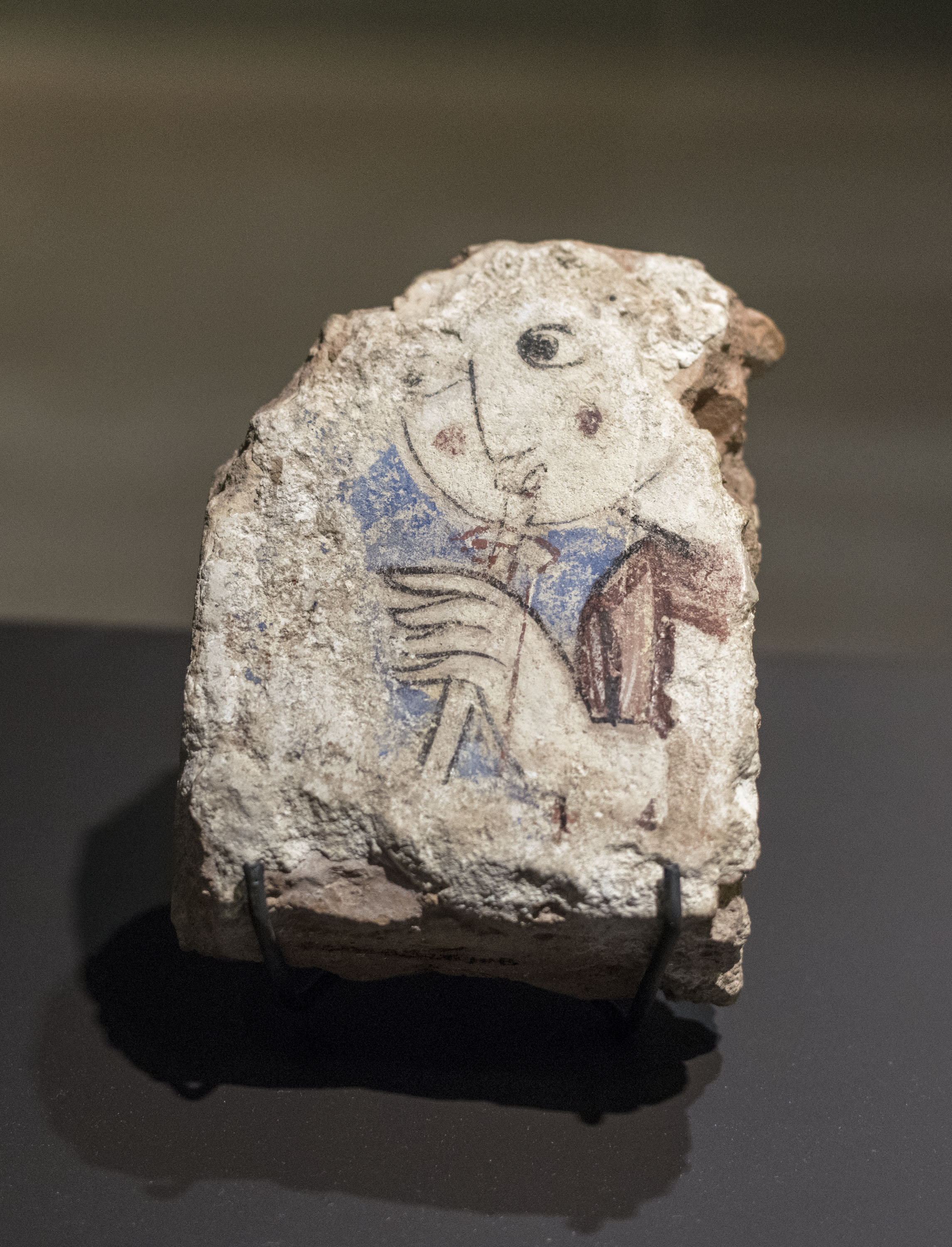 Pequeño fragmento de pintura sobre yeso donde aparece una mujer tocando una flauta andalusí llamada mizmar. Es del siglo XII y estaba en el Palacio Dar Al Sugra en Murcia. Se expone en el Museo Santa Clara de Murcia.